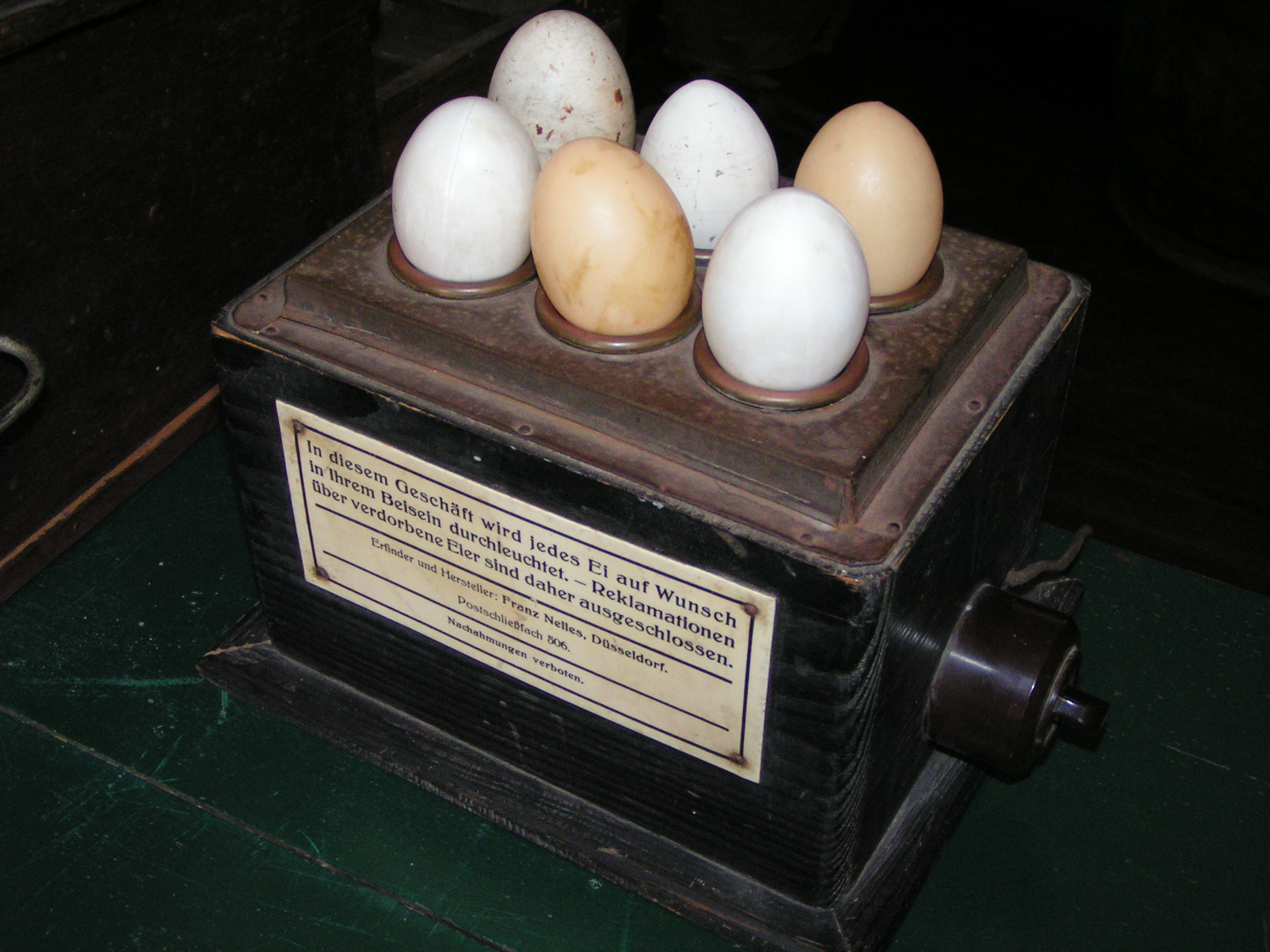 Eier-Durchleuchtung